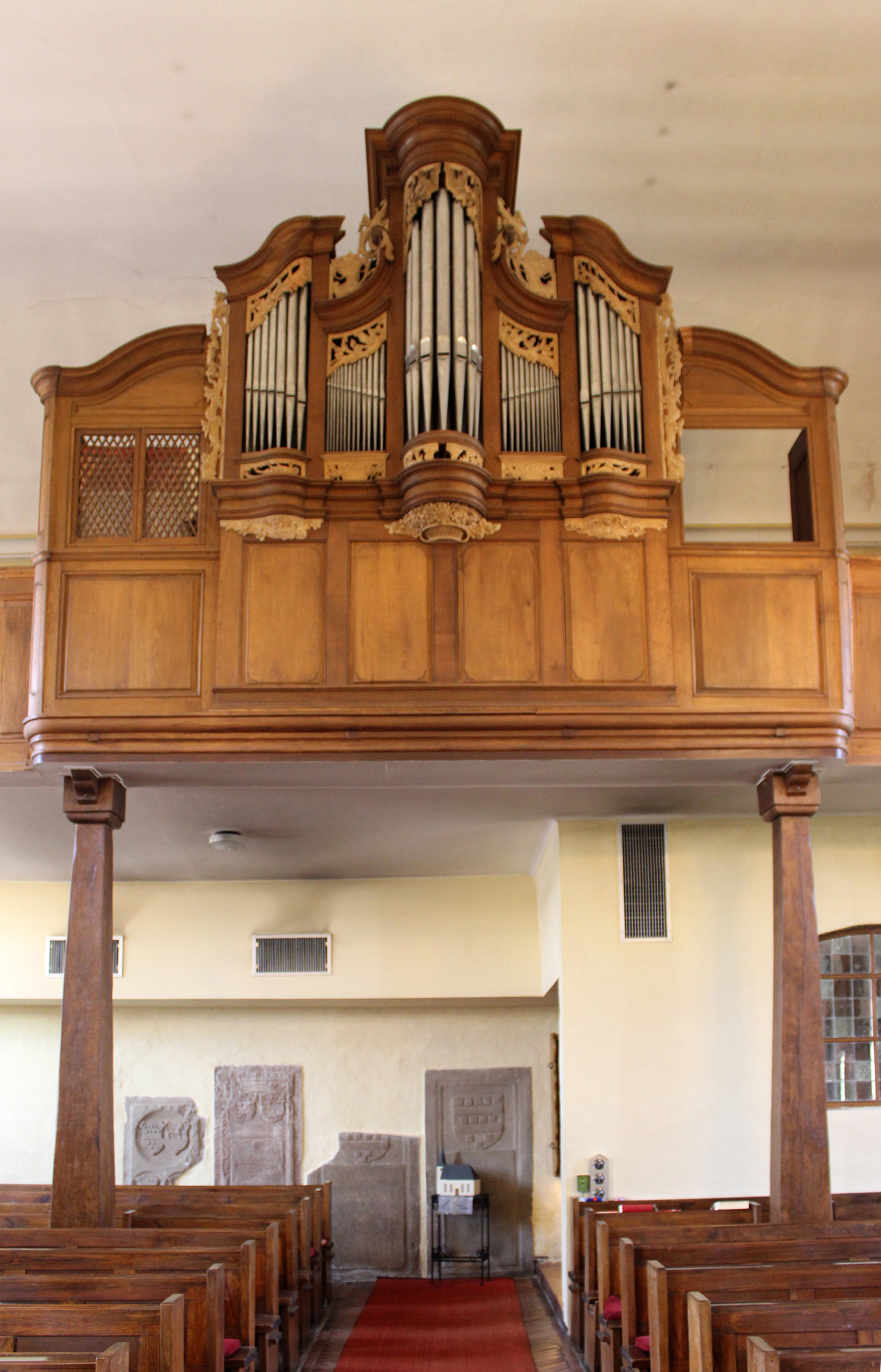 Blick ins Innere der evangelischen Kirche in Sötern, Gemeinde Nohfelden, Landkreis St. Wendel, Saarland